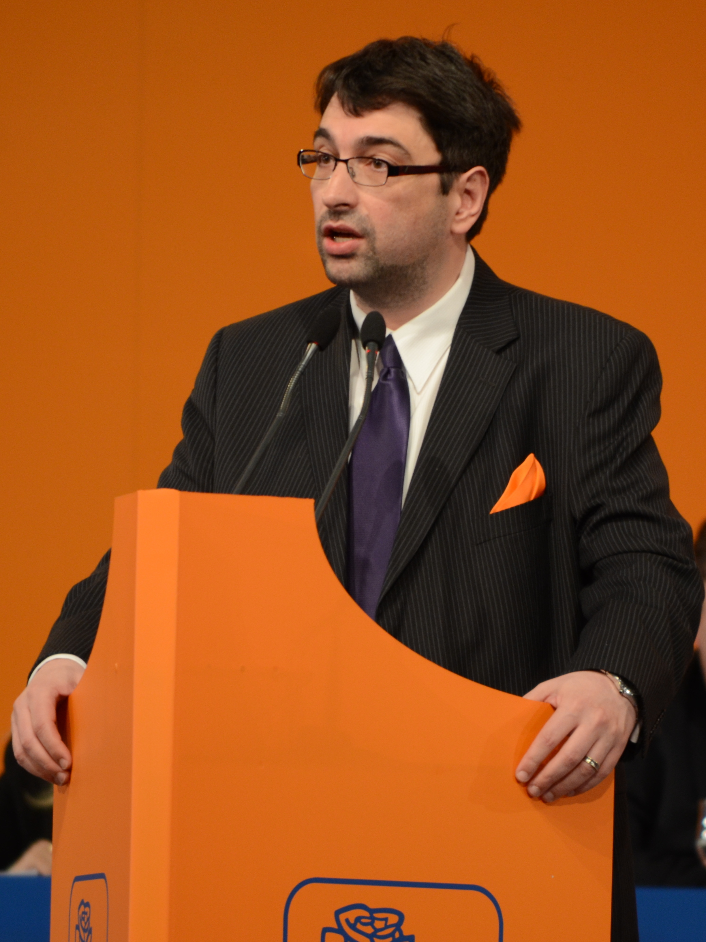 Sever Voinescu (la Convenția națională extraordinară a Partidului Democrat-Liberal, 23 martie 2013)